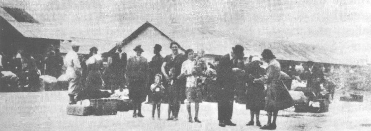 Slovenski izgnanci v ustaškem taborišču Slavonska Požega.